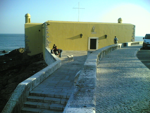 Forte de Nossa Senhora de Porto Salvo, Oeiras, Portugal.